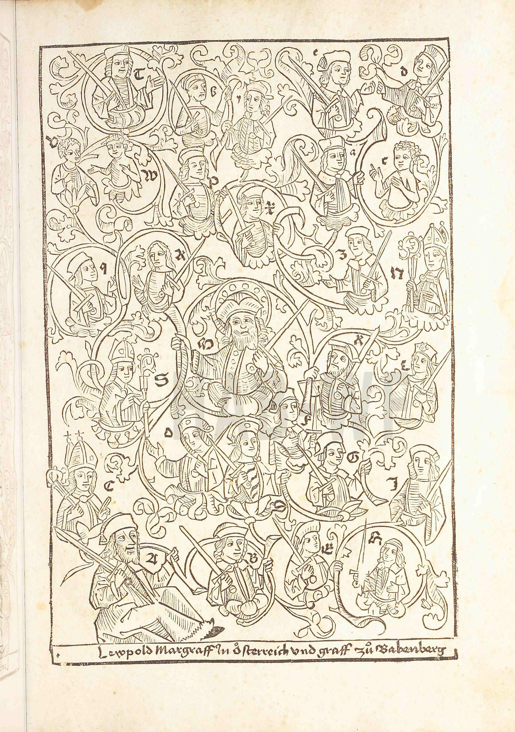 Ladislaus Sunthaym: Der löblichen Fürsten und des Landes Österreich Altherkommen und Regierung Printed by Michael Furter in Basel, not before 1491